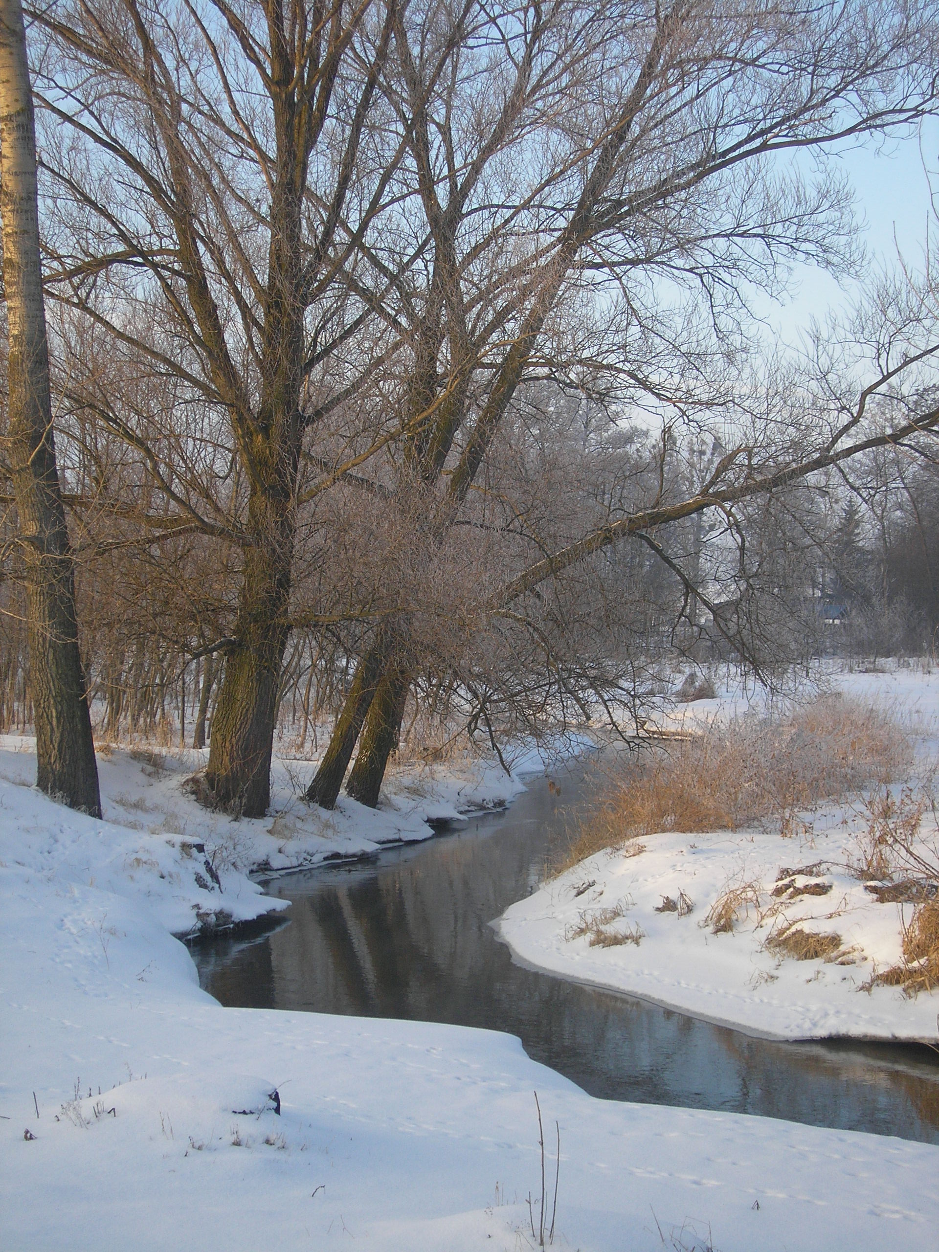 Kurówka River in Chrząchów, Poland